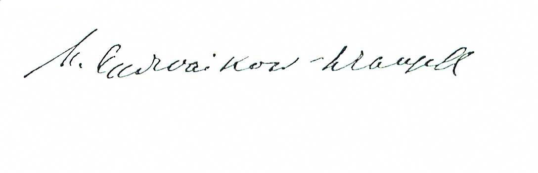 Margarete von Wrangell Signatur 1929 Unterschrift zu einer autobiographischen Skizze in Führende Frauen Europas, 2 Bände. München 1928 und 1930